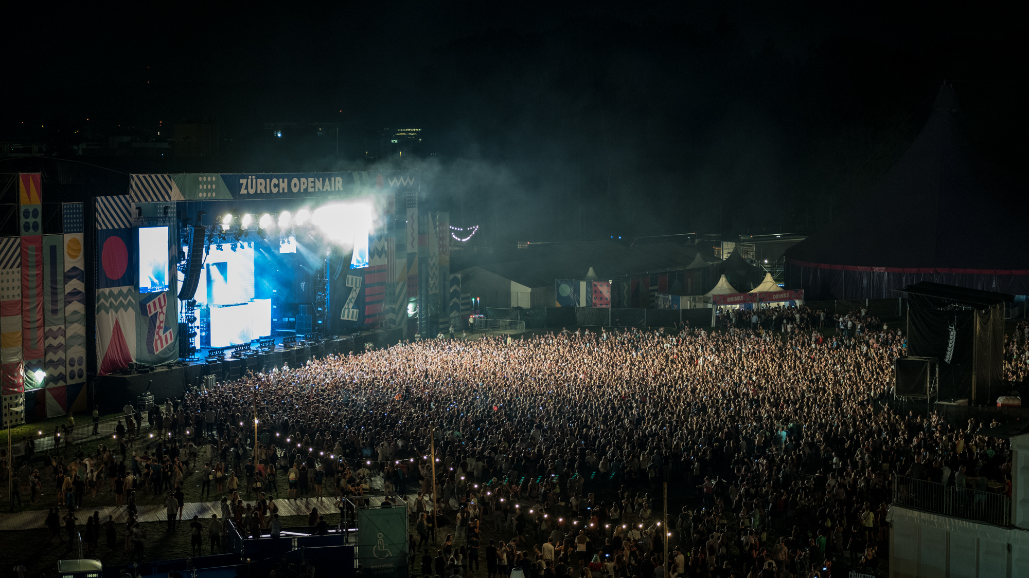 Freitag 25.08.2017: Kygo am Zürich Openair 2017, Schweiz.